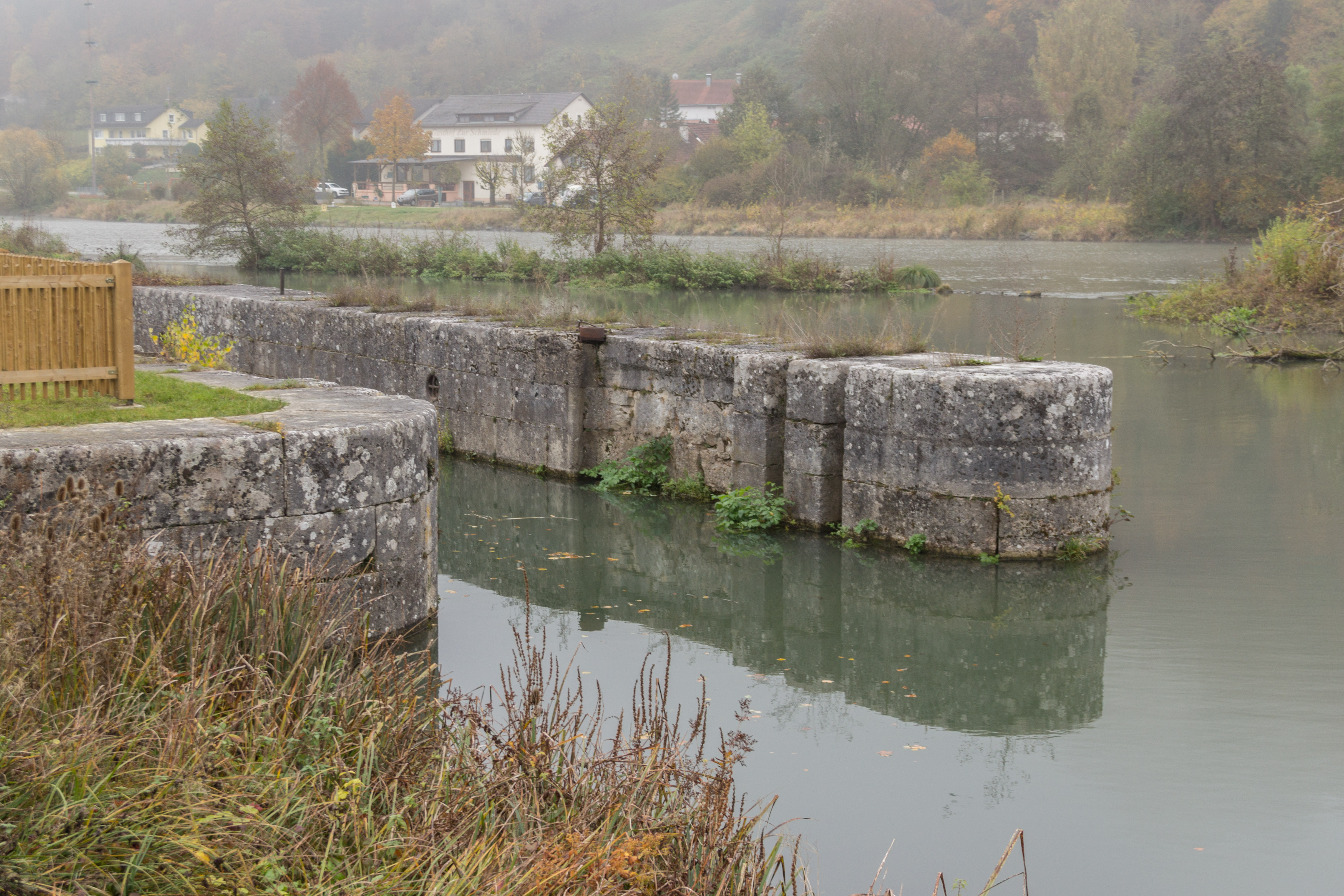 Ludwig-Donau-Main-Kanal, Schleuse 10, Schleuse, Riedenburg, Untereggersberg